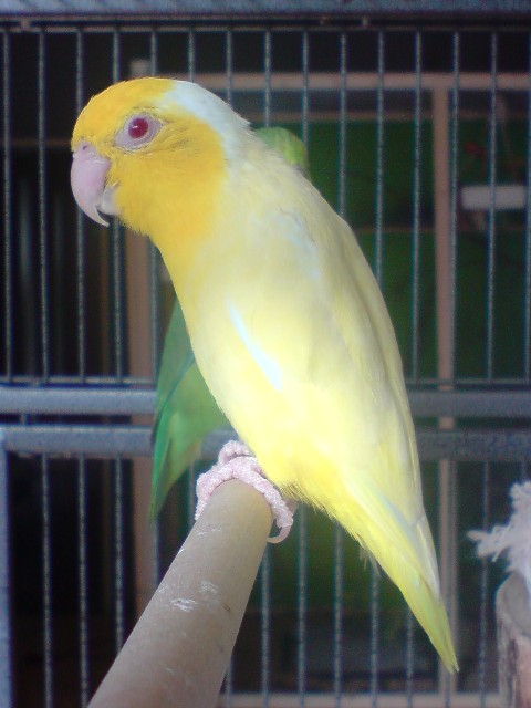 Forpus Coelestis Mutation Lutino 1.0